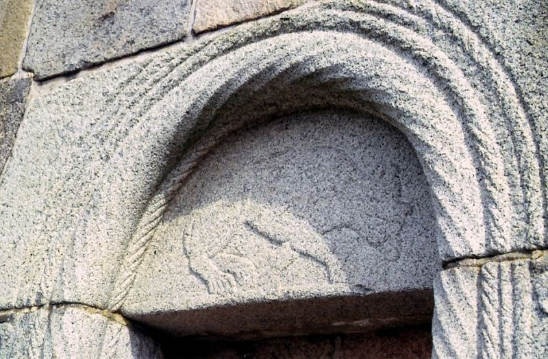 Rimsø Kirke i Danmark. Sydportal